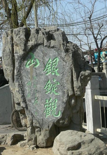 银锭观山 用心阁于2005年3月29日拍摄于什刹海